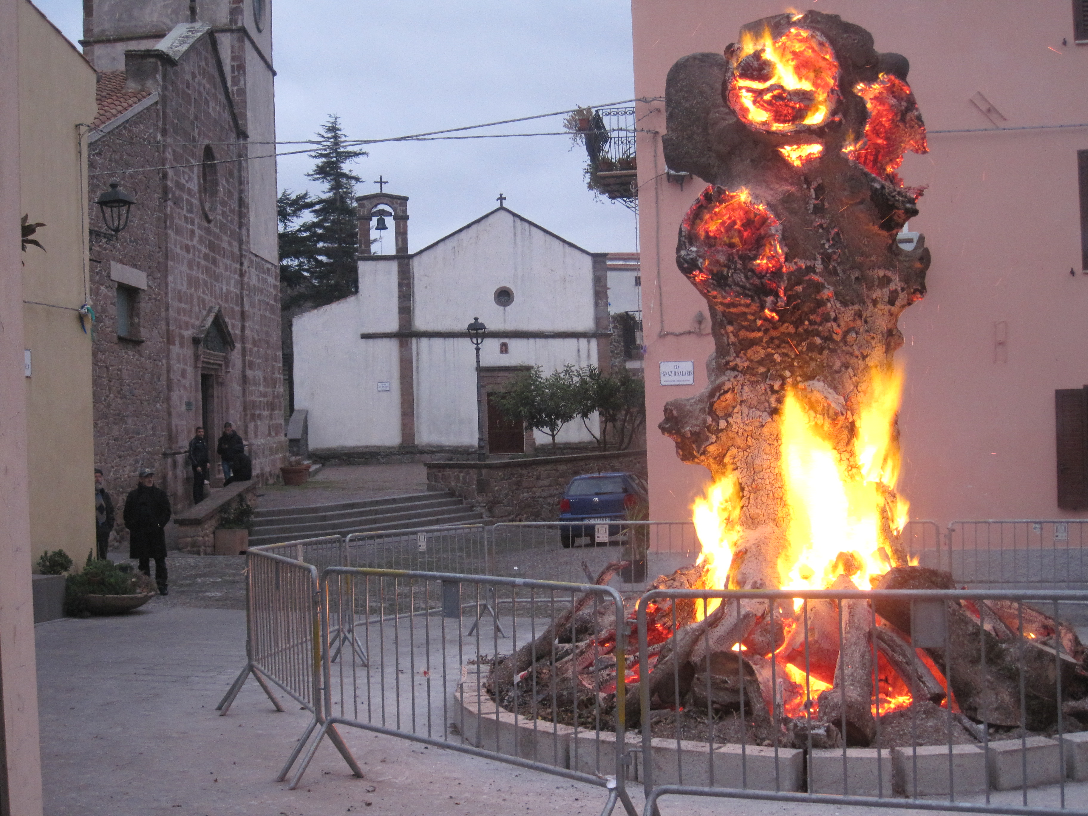 Bortigali. Festa di S. Antonio Abate. La grande "tuva" del 2012. Sullo sfondo le faciate della Parrocchiale e della Chiesa del Rosario.